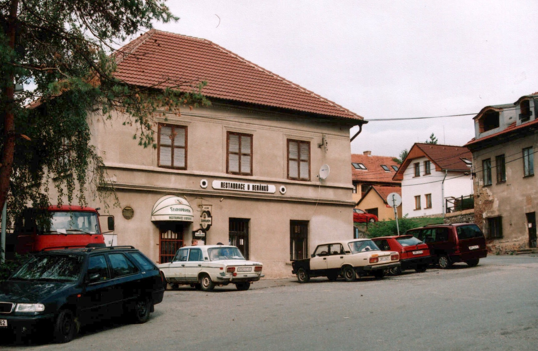 Třebonice (Praha) - restaurace